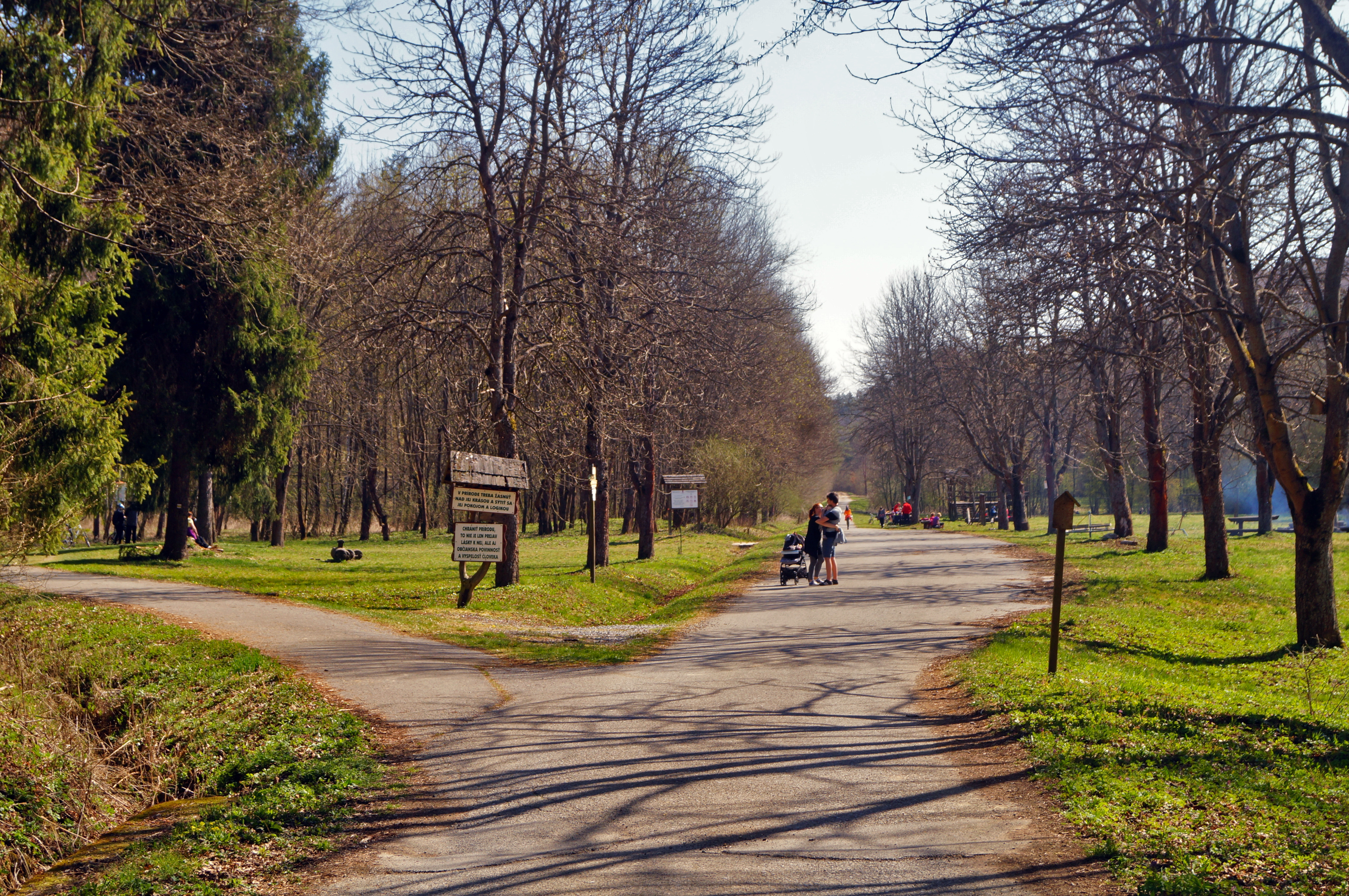 Lesopark na Cemjate - Kvašná voda